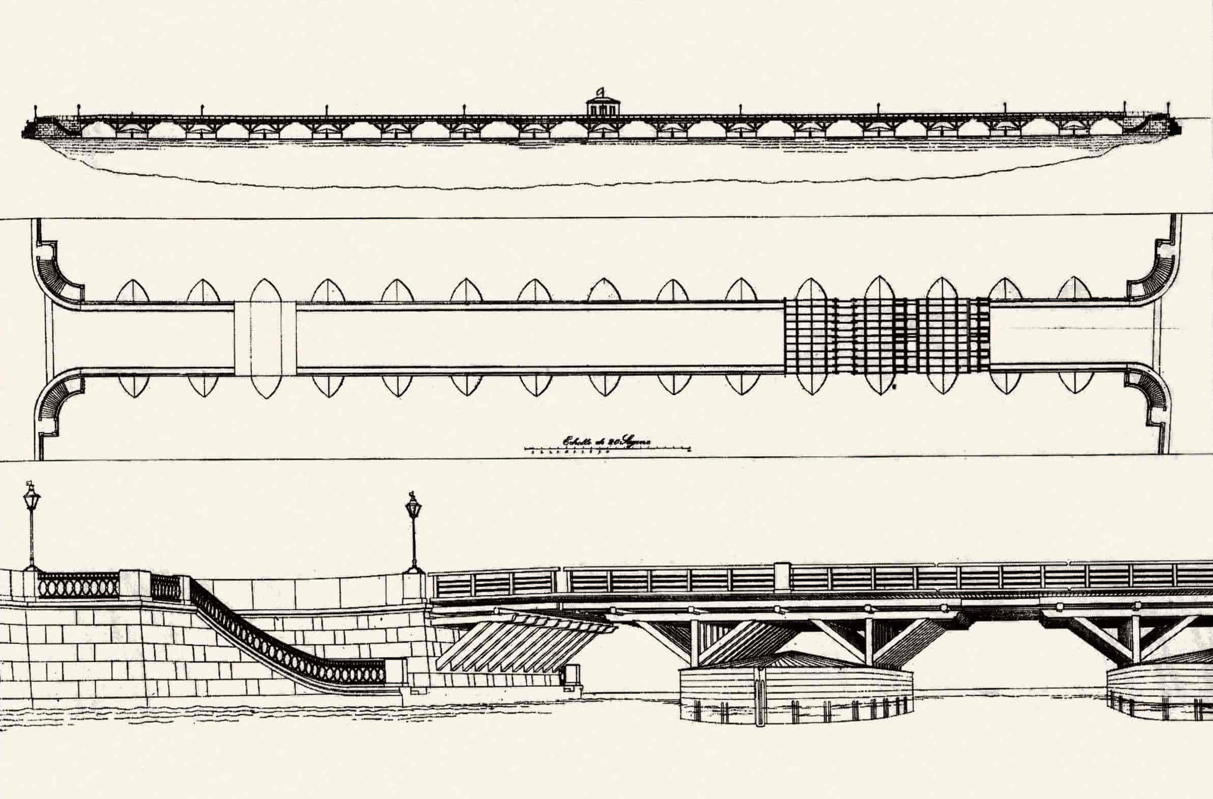 Исаакиевский наплавной мост через Неву в Санкт-Петербурге после реконструкции 1820—1821 гг.